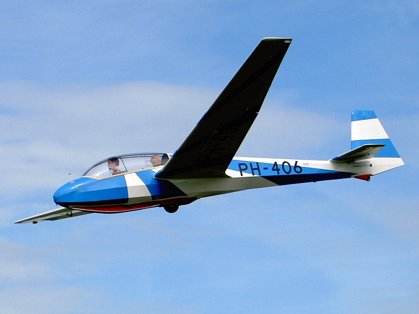 PH-406 Schleicher ASK-13 at Teuge